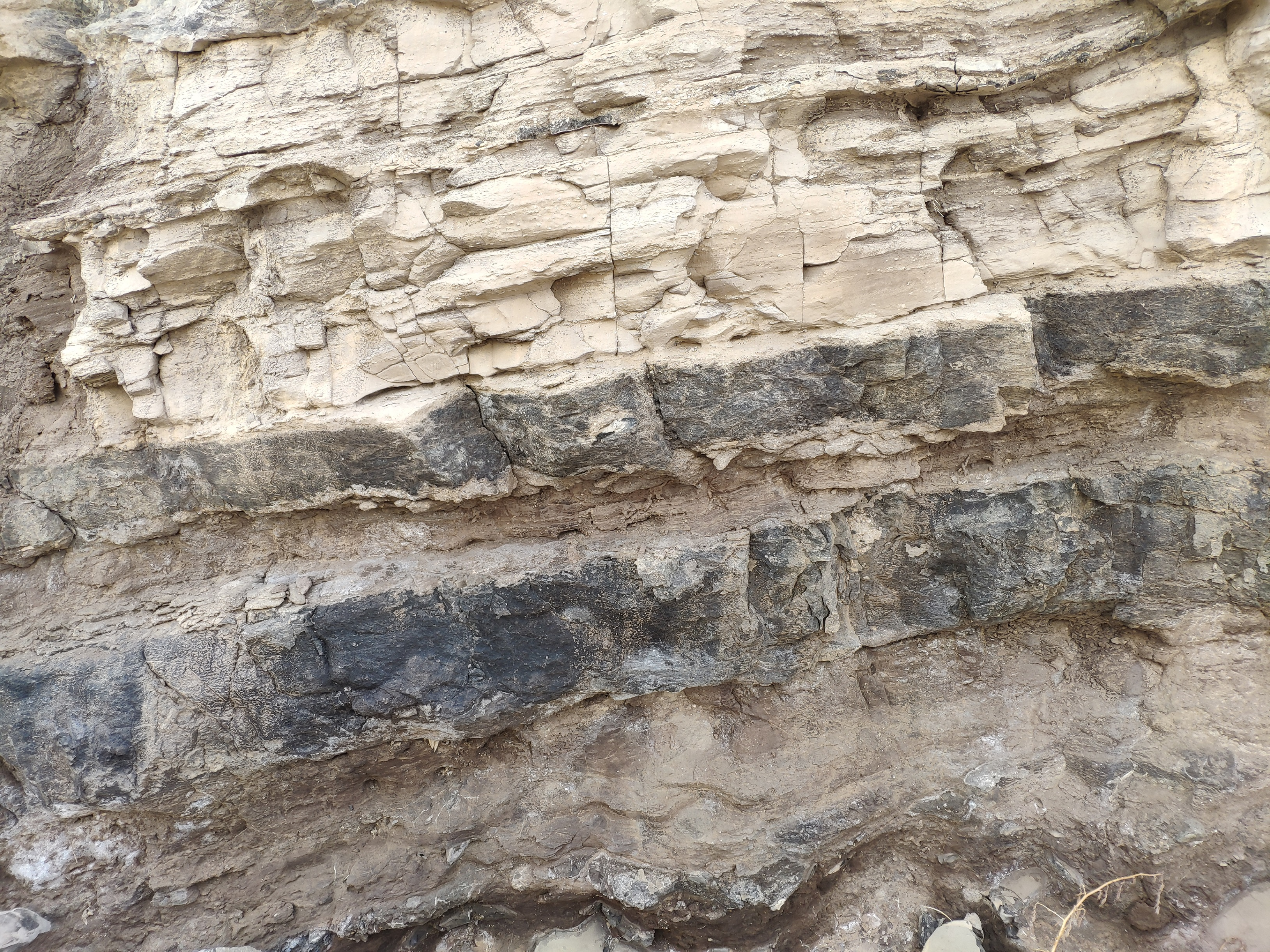 סלע פוספוריט (שחור) בין סלעי קירטון בהירים, על כביש 31, מדרום מזרח לערד.